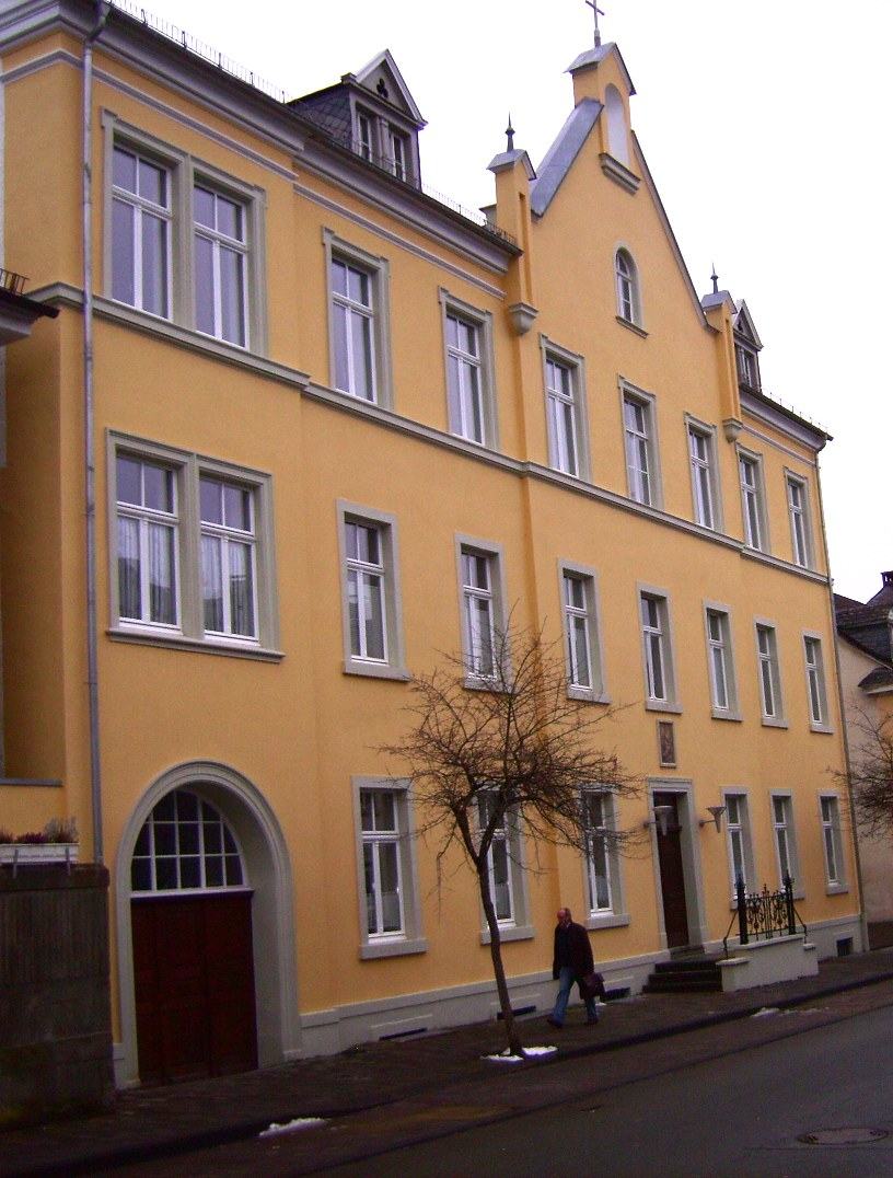 Mariengymnasium Arnsberg (ehemaliges Hauptgebäude)